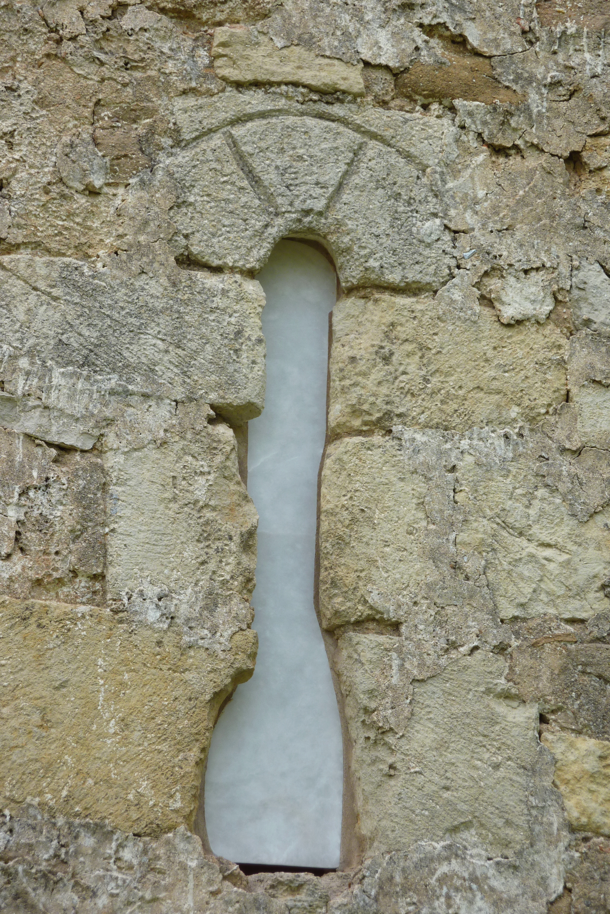 Ermita de San Pelayo in Perazancas de Ojeda, einem Ortsteil von Cervera de Pisuerga in der Provinz Palencia (Kastilien-León/Spanien), Apsisfenster